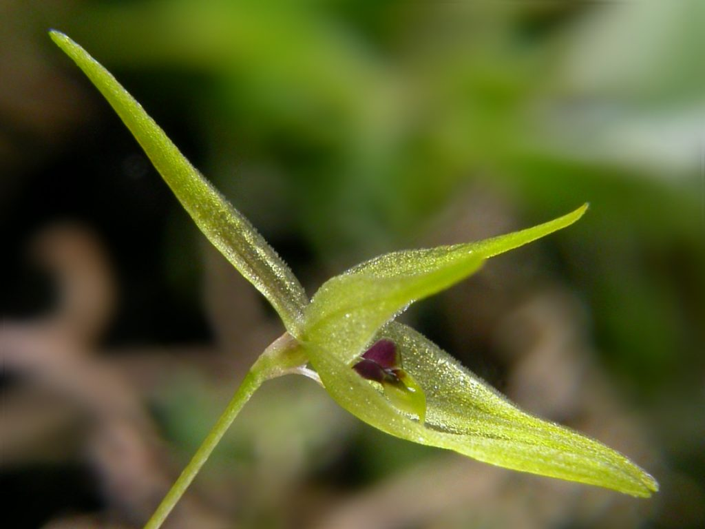 Barbosella gardnerii, a espécie tipo do gênero Barbosella